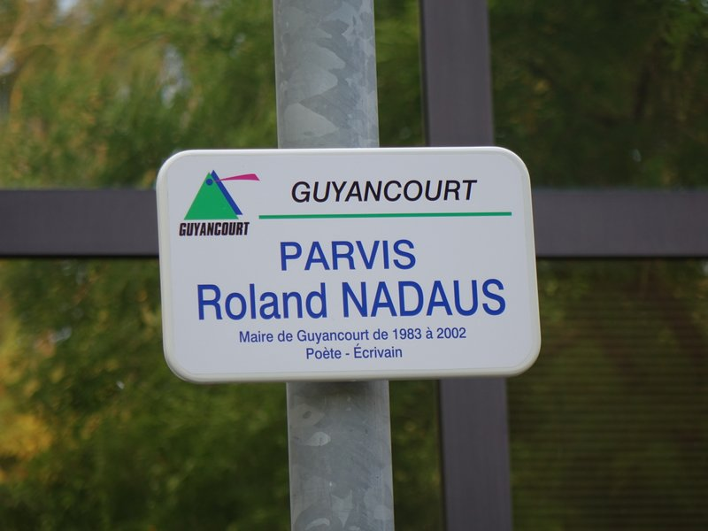 Place de l'Hôtel de Ville